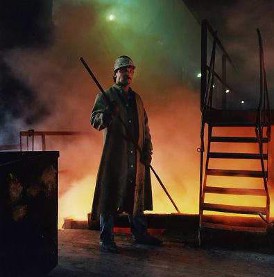 Motiv aus der Ausstellung "Arbeitswelt" von Manfred Zimmermann